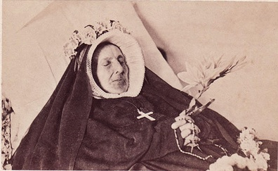 Madlaine Sophie Barat